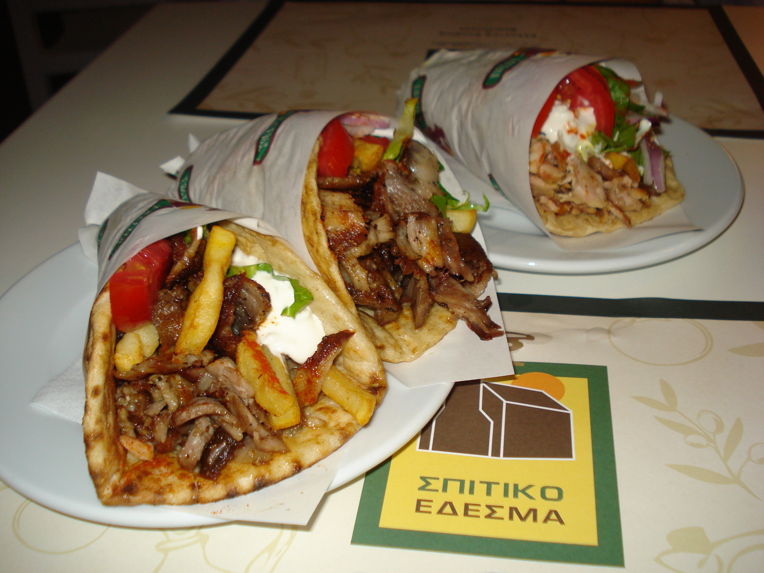 Pita giros de porc (els dos primers) i de pollastre (l'últim).